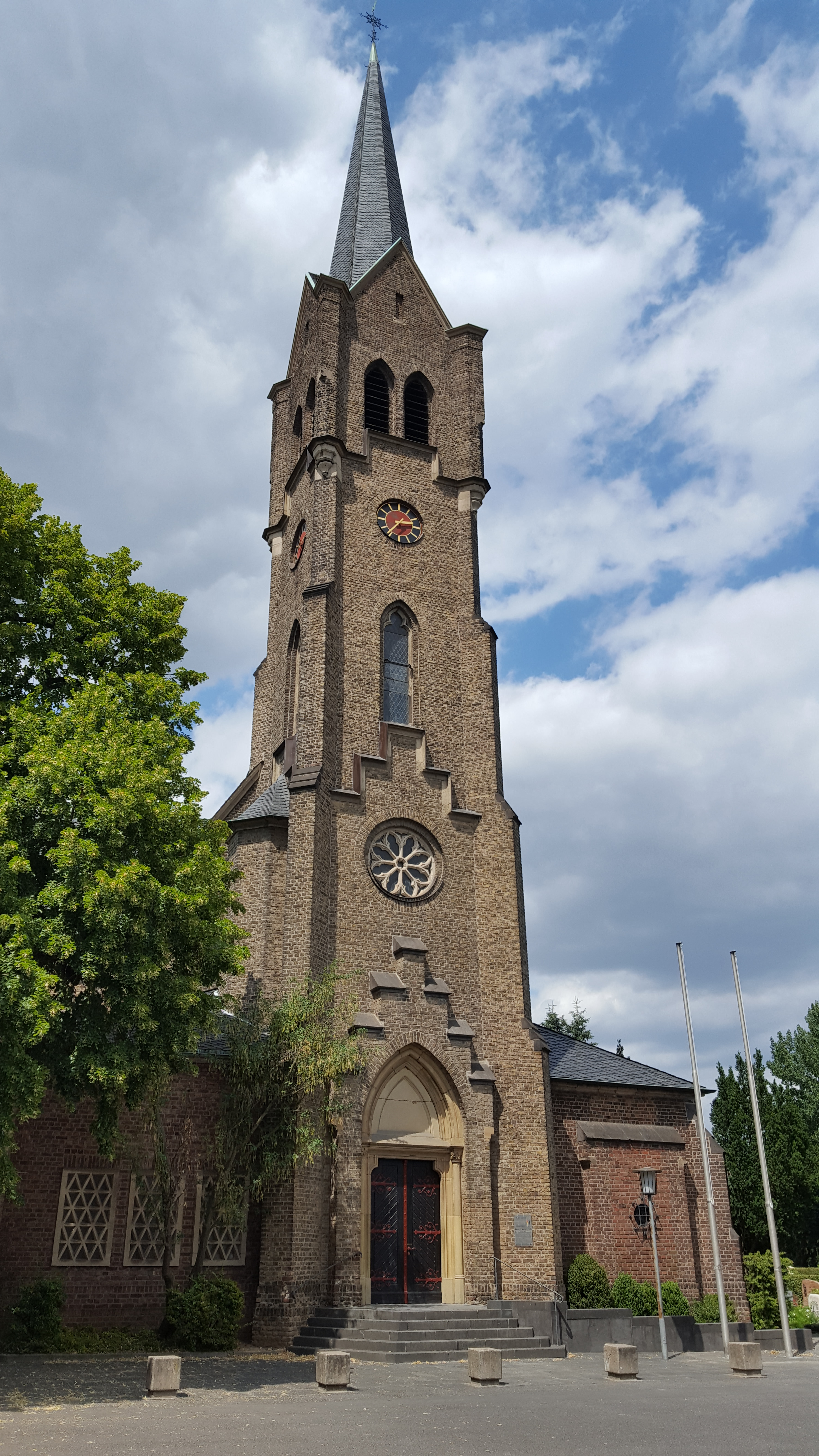 Katholische Pfarrkirche St. Evergislus, Hardtstraße 13, Bonn-Plittersdorf (Stadtbezirk Bad Godesberg)